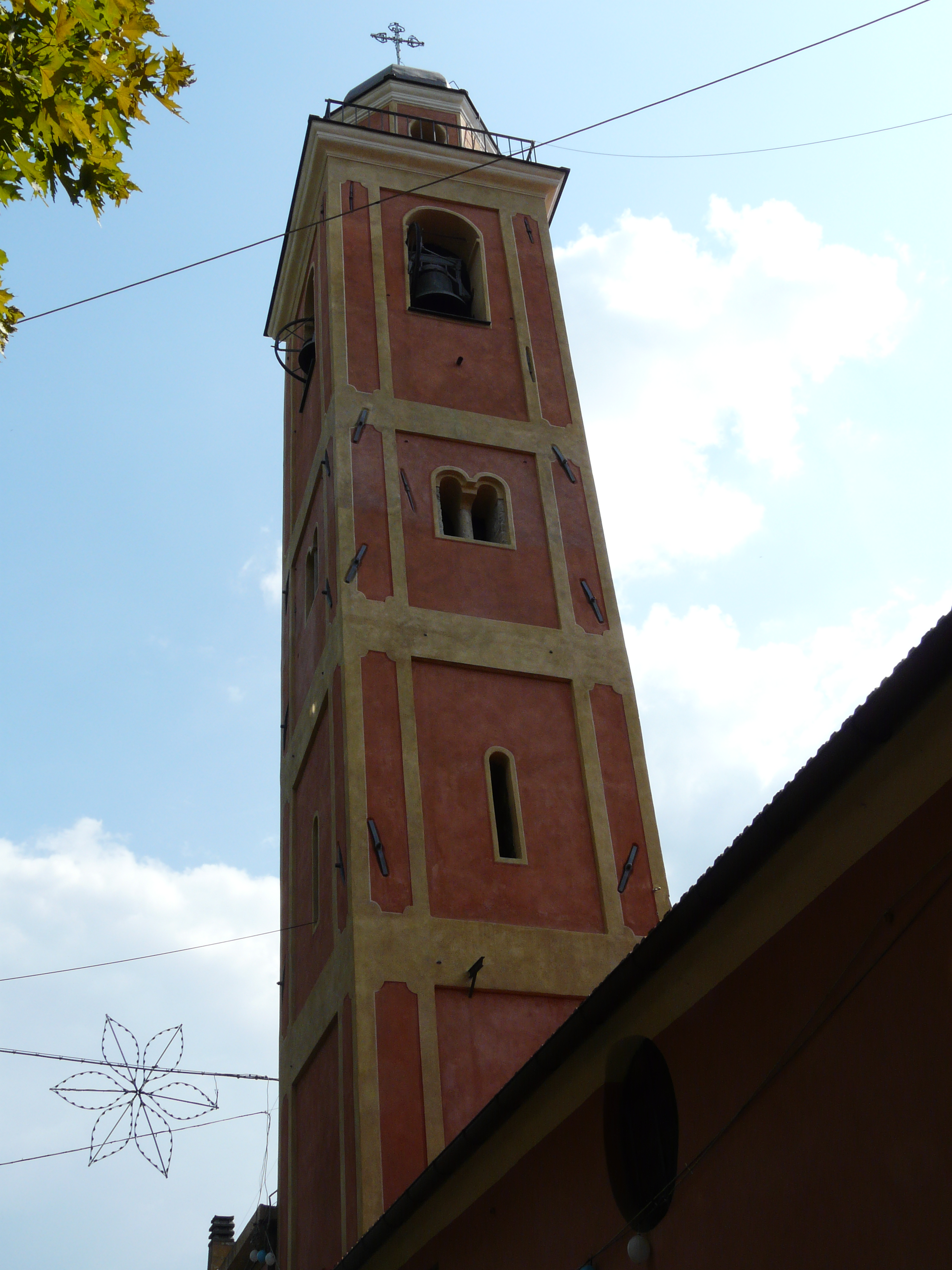 Chiesa di Sant'Ambrogio, Mignanego, Liguria, Italia